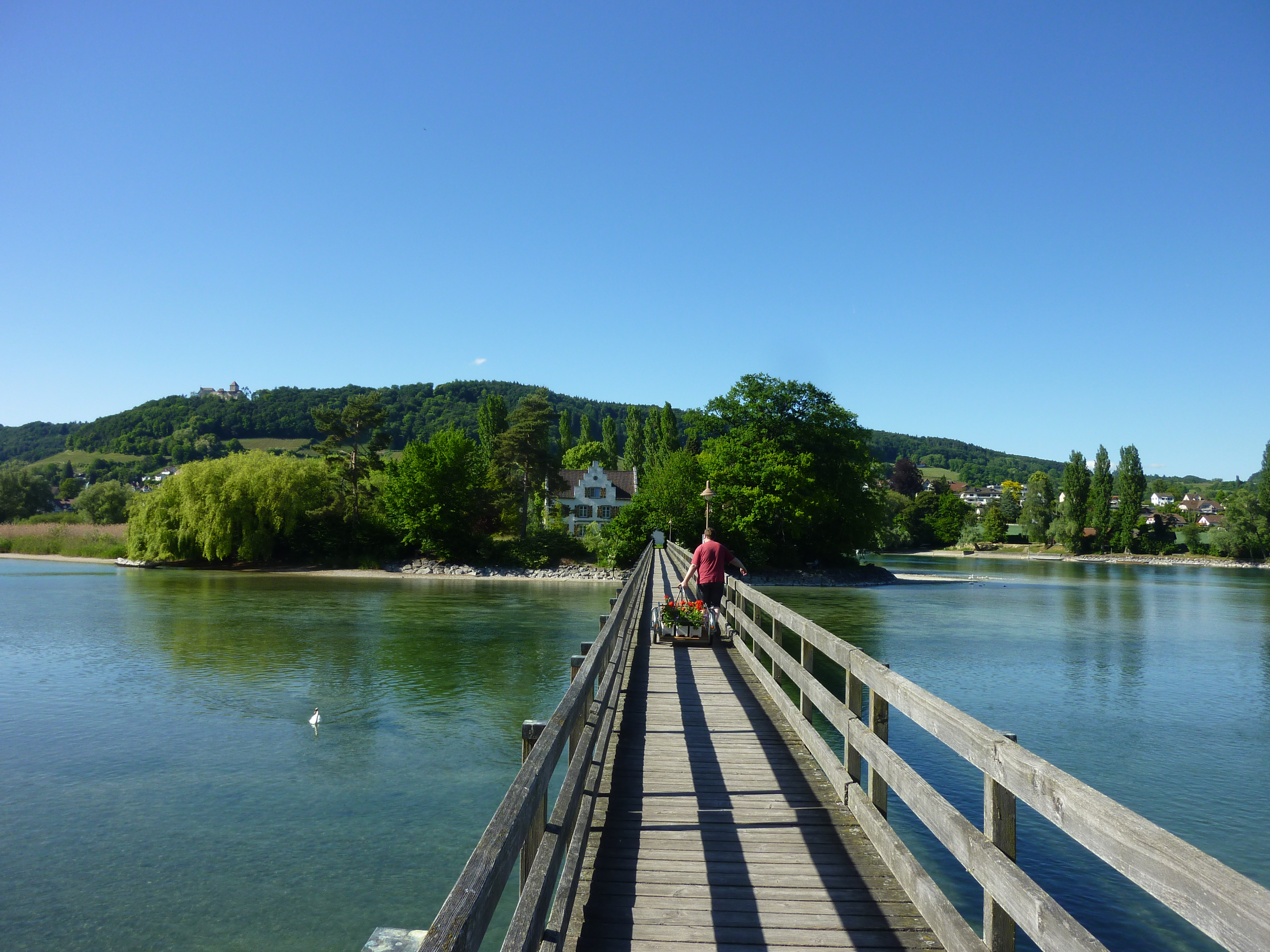 Brücke zur Werdinsel (Bodensee)]